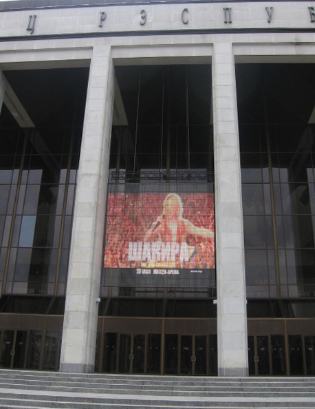 Реклама с выступлением Шакиры на здании Дворца Республики РБ, Минск